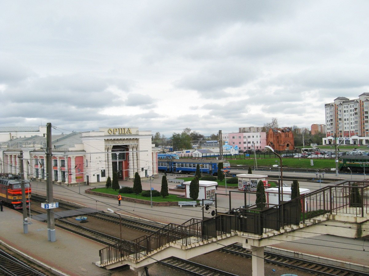 Орша. Вакзал